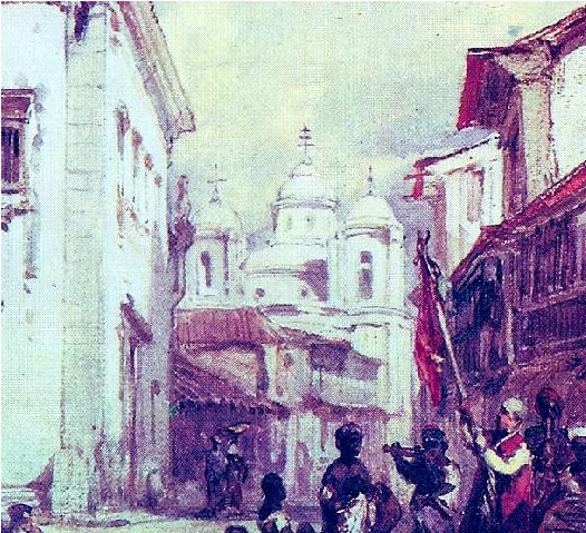 Aquarela o Brasil, Eduard Hildenbrant